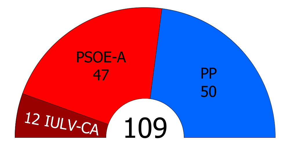 Composición del Parlamento de Andalucía en su IX Legislatura